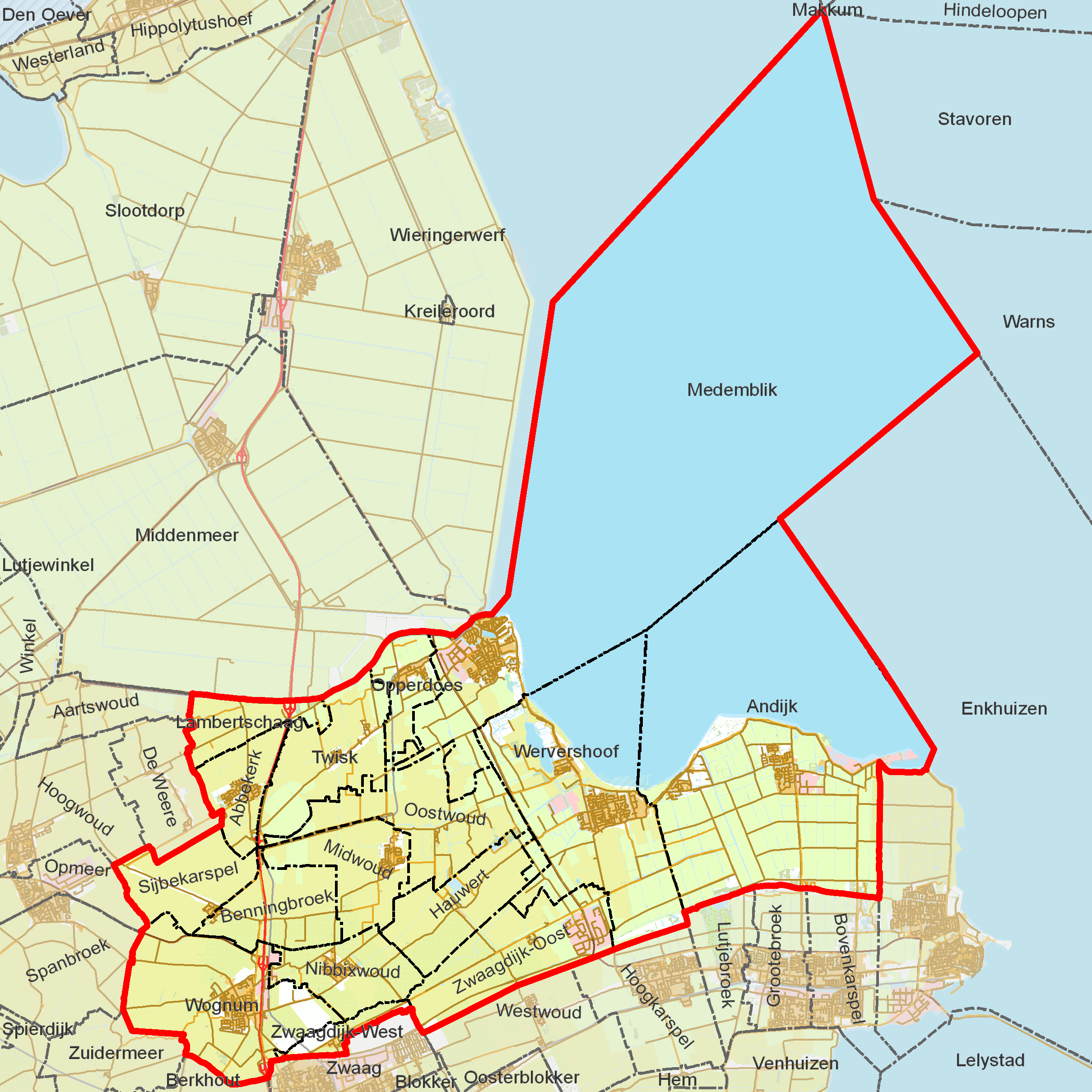 BAG woonplaatsen - Gemeente Medemblik.png